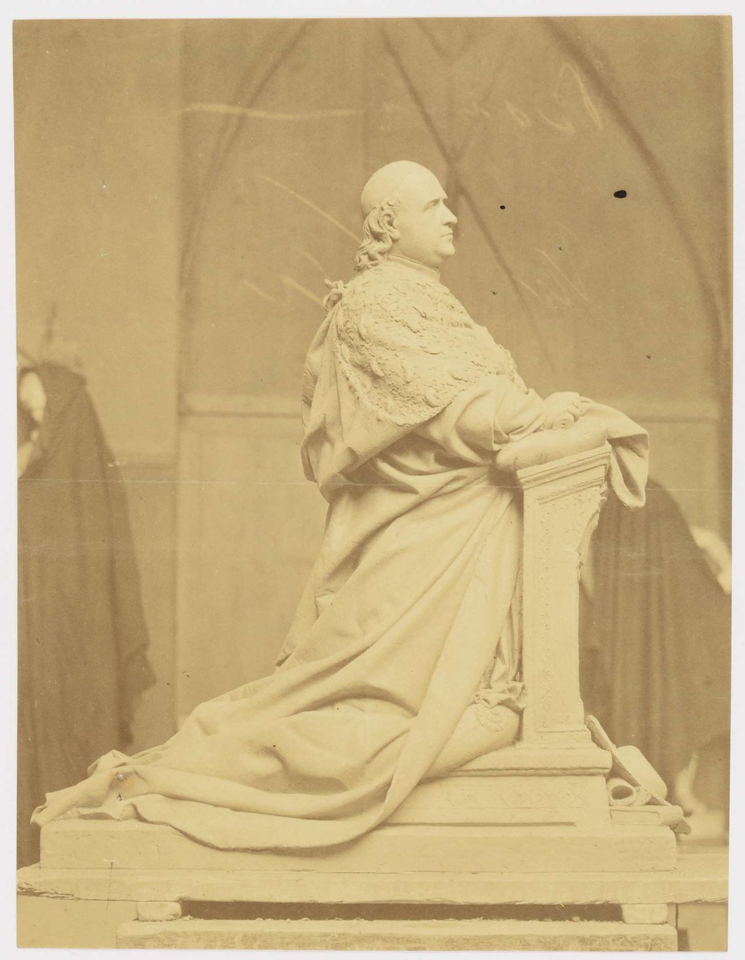 Monument à la mémoire du cardinal Pie : vue de profil du plâtre préparatoire au monument (le cardinal est représenté agenouillé sur un prie-Dieu). Accompagnée d'une note de la direction des Cultes. Échelle : 5 cm / 1 m. Photographie issue des dossiers de travaux de restauration des cathédrales (1802-1912, conservés aux Archives nationales (inventaire et documents numérisés consultables en ligne).